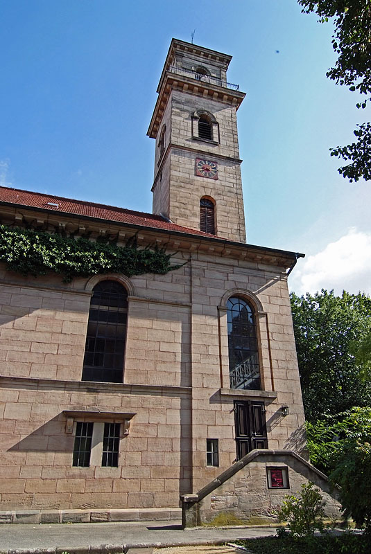 Auferstehungskirche im Stadtpark Fürth